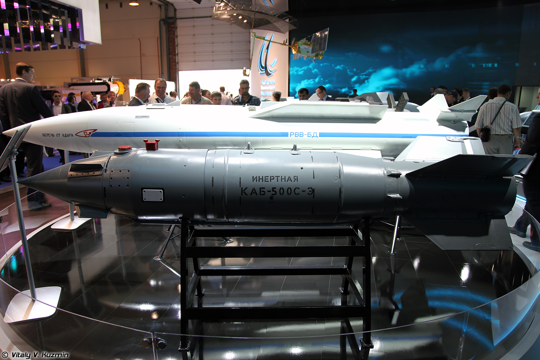 Авиабомба КАБ-500С-Э (KAB-500S-E guided bomb)